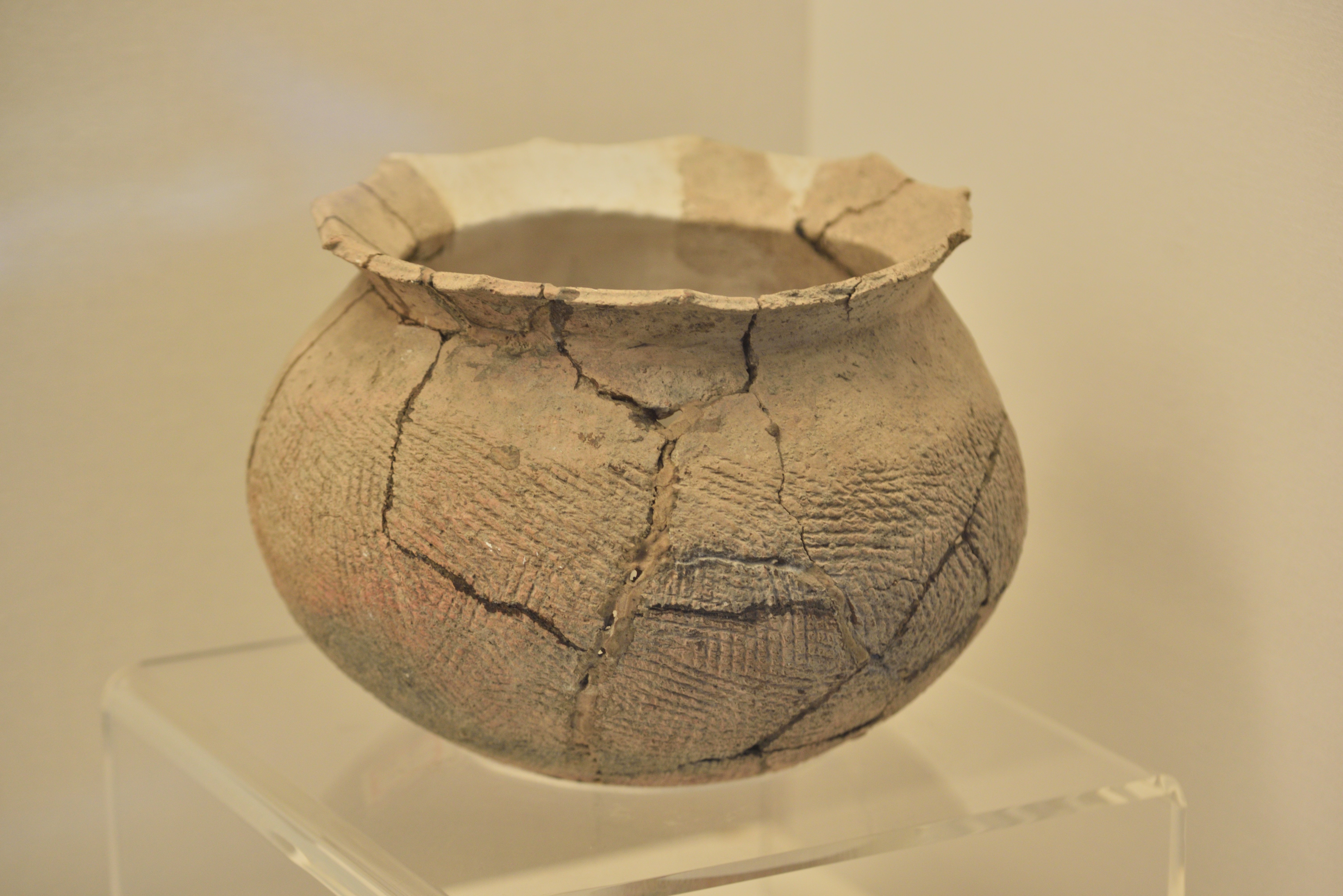 名山后遗址出土多角沿陶釜